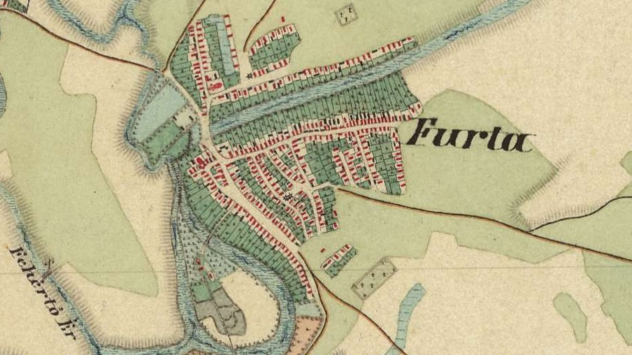 Furta térképe a Magyar Királyság (1819–1869) - második katonai felmérése során.